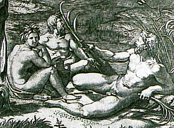 detail